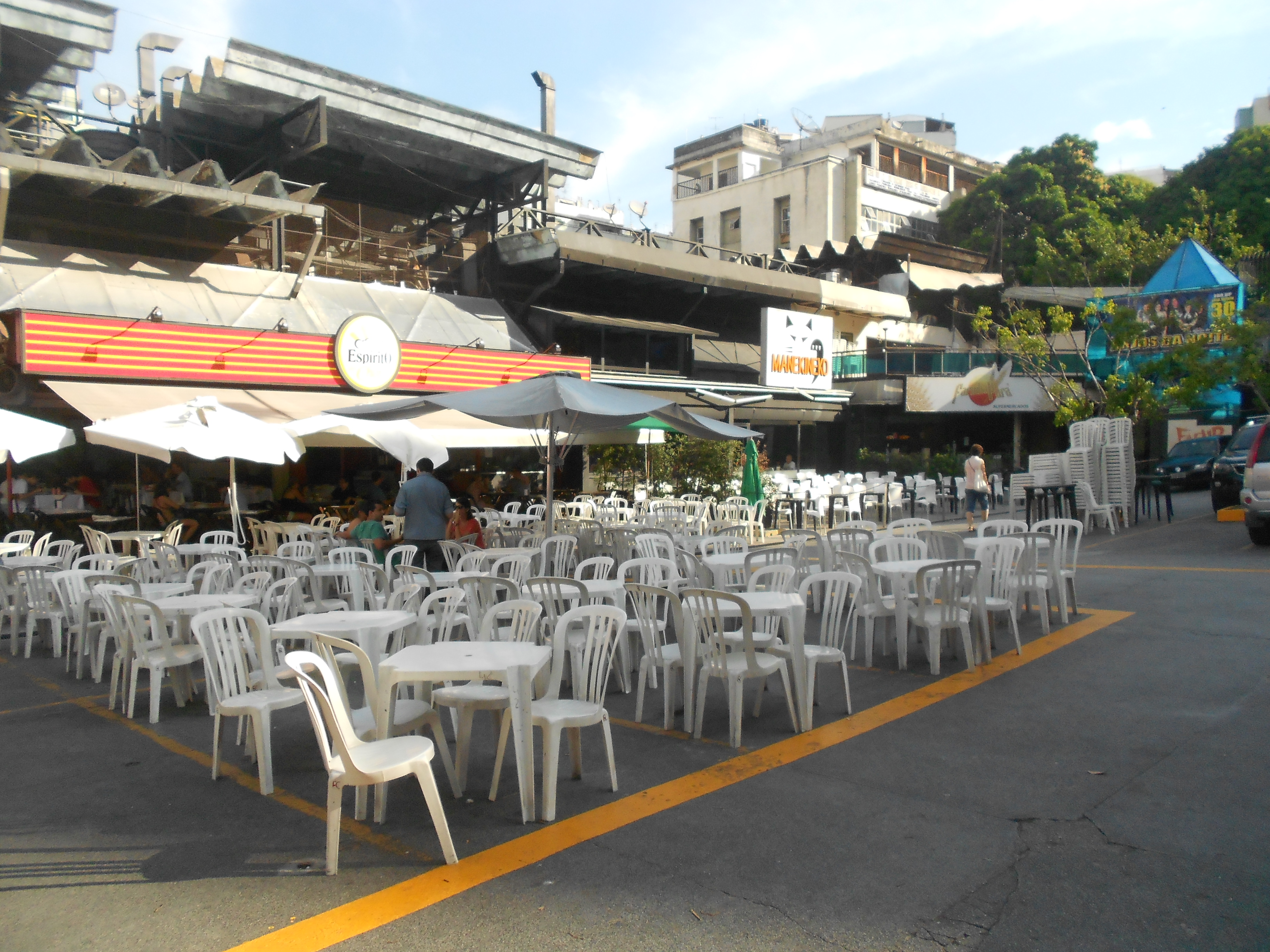 Cobal do Humaitá, Rio de Janeiro, Brasil.